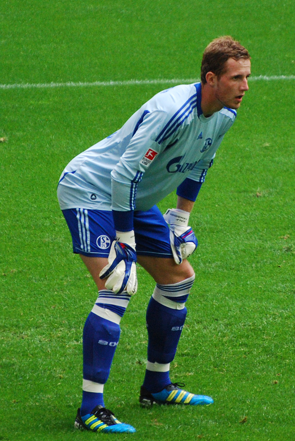 Ralf Fährmann, Spieler des FC Schalke 04